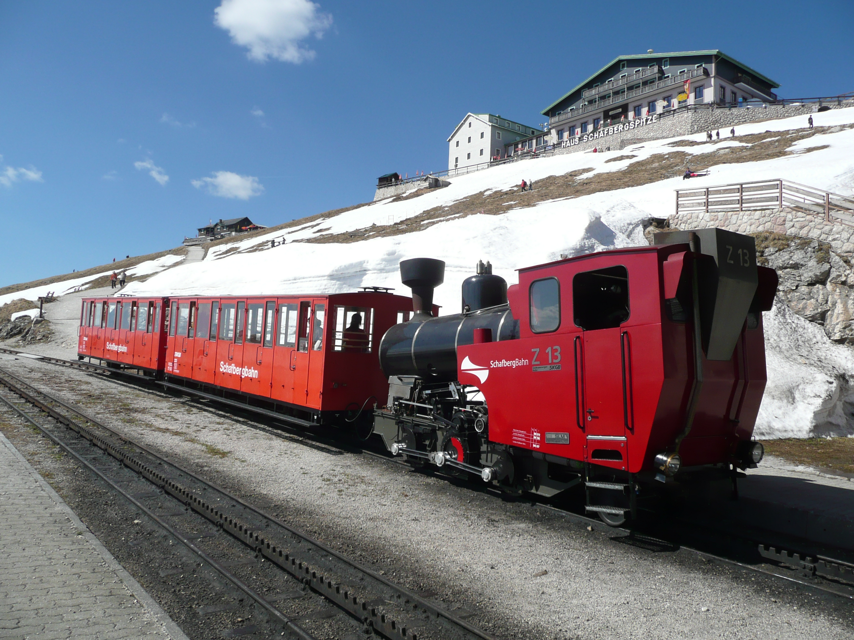 Zug der Schafbergbahn mit Lok Z 13 und Wagen 223 und 213 an der Endstation Schafbergspitze